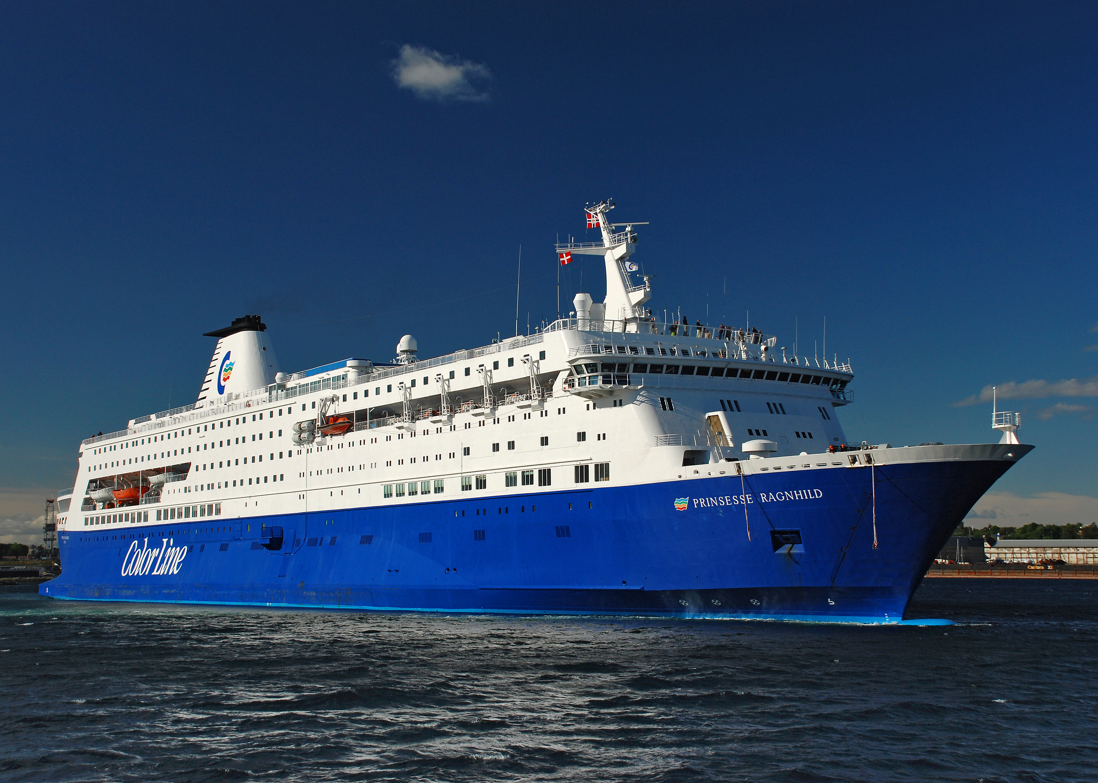 Colorline Fährschiff Prinsesse Ragnhild , Route Stavanger (NO) - Hirtshals (DK)